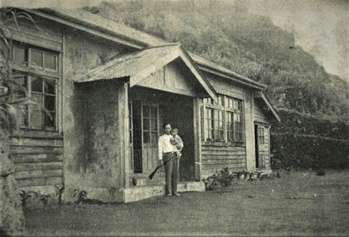 八丈小島の鳥打小中学校（昭和25年頃）